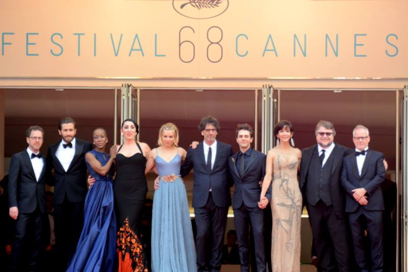 Ethan Coen, Jake Gyllenhall, Rokia Traoré, Rossy de Palma, Sienna Miller, Joel Coen, Xavier Dolan, Sophie Marceau, Guillermo del Toro et Thierry Frémaux au festival de Cannes